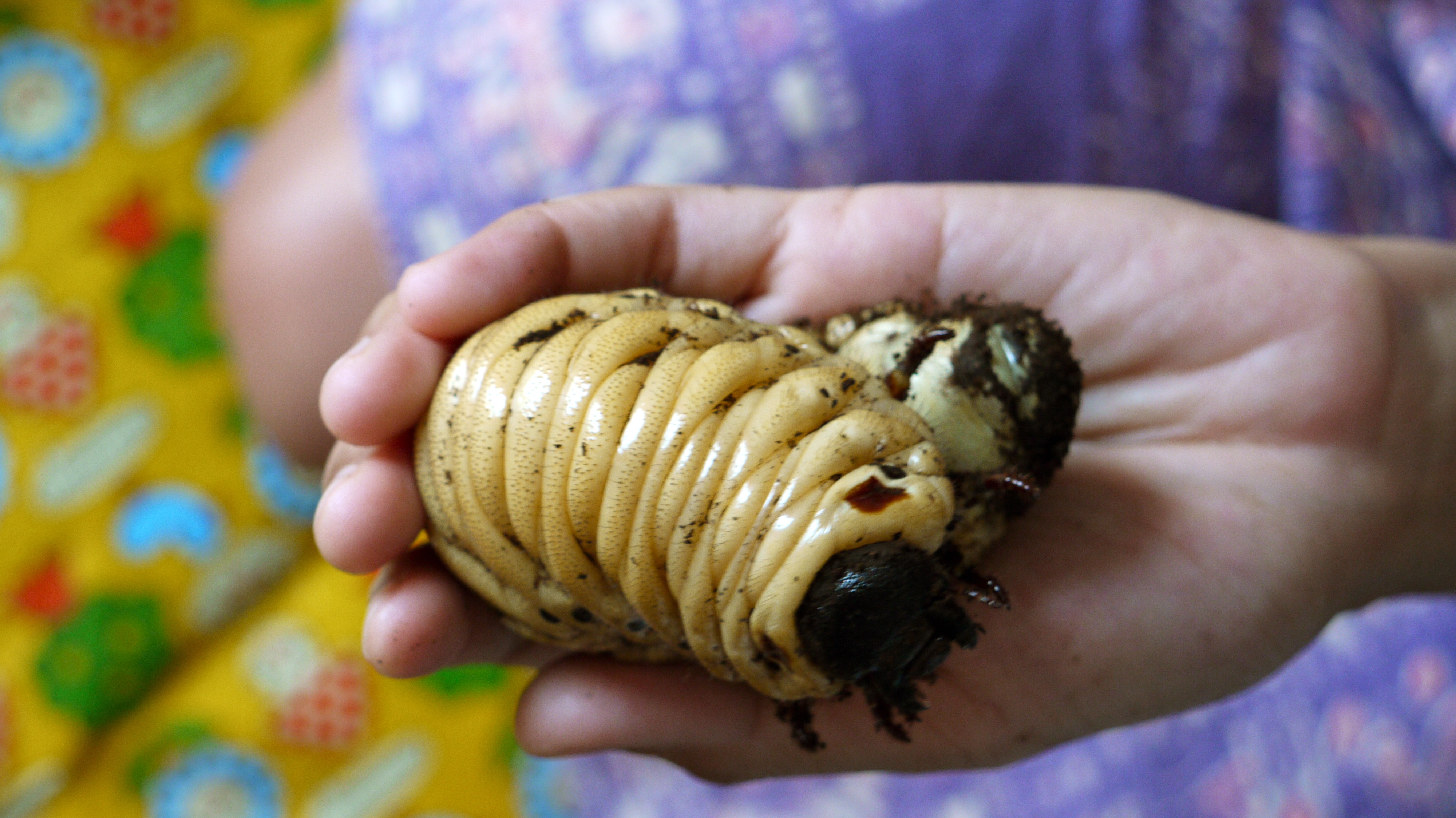 Hercules beetle larva